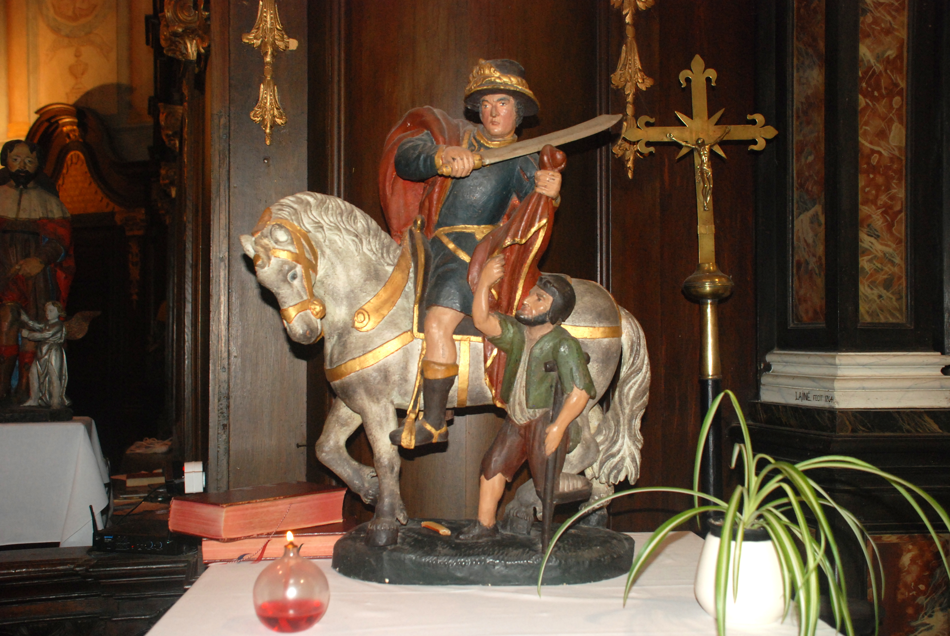 Belgique - Brabant wallon - Église Saint-Martin de Ways